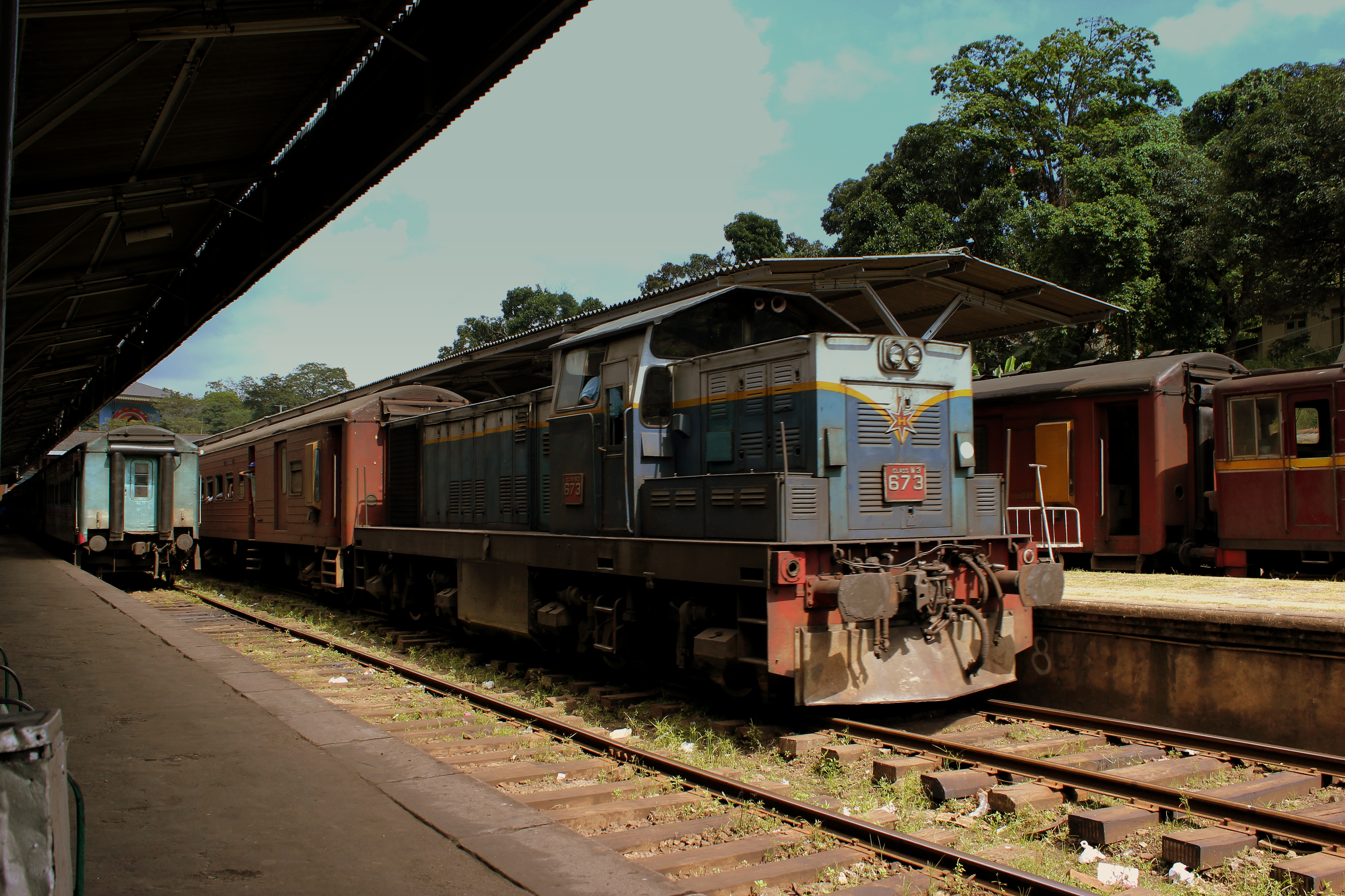 CLASS M3 SRI LANKAN RAILWAYS LOCO HAULED TRAIN AT KANDY RAILWAY STION SRI LANKA JAN 2013